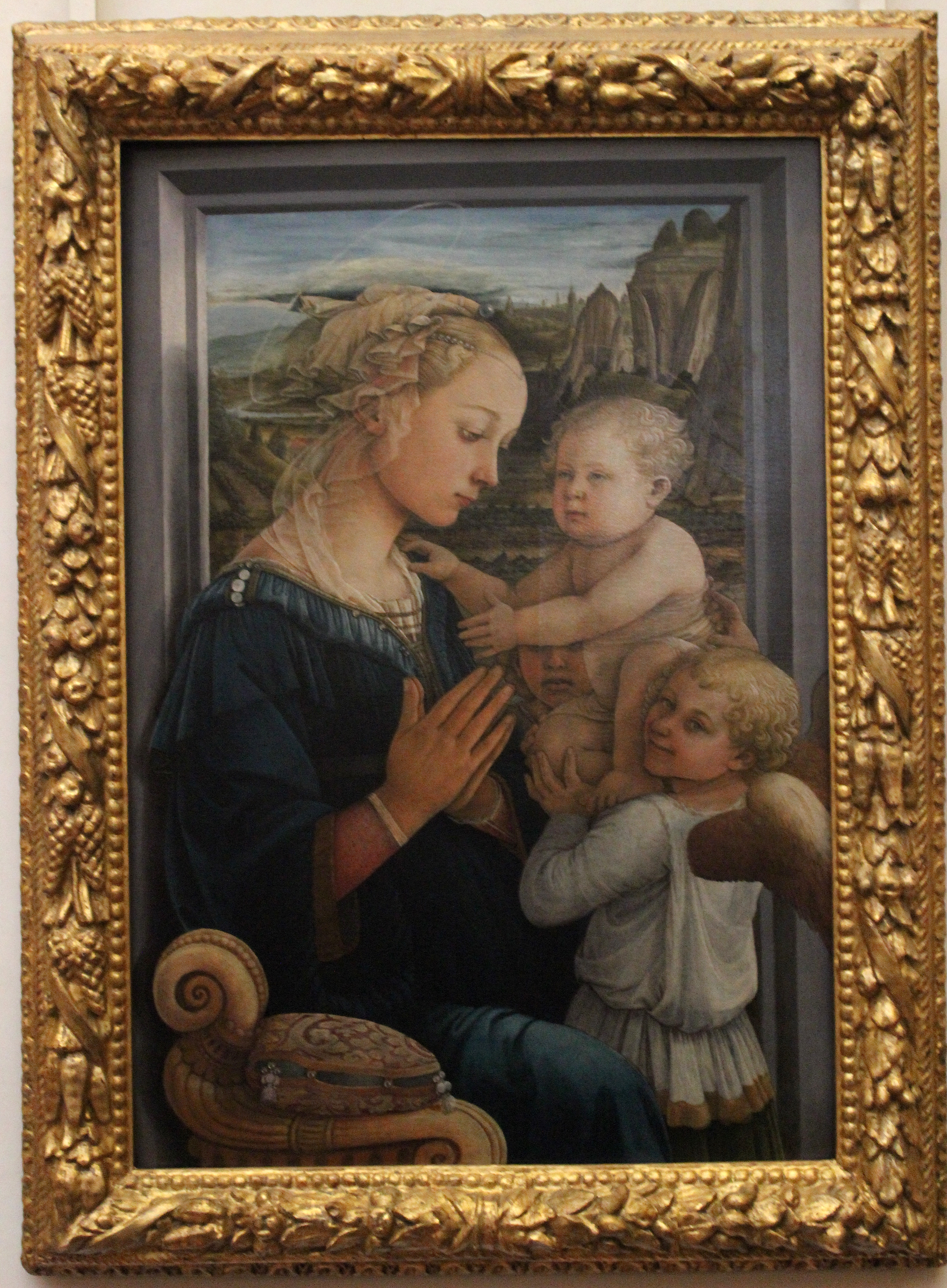 Uffizi. Virgen con el Niño por Filippo Lippi.